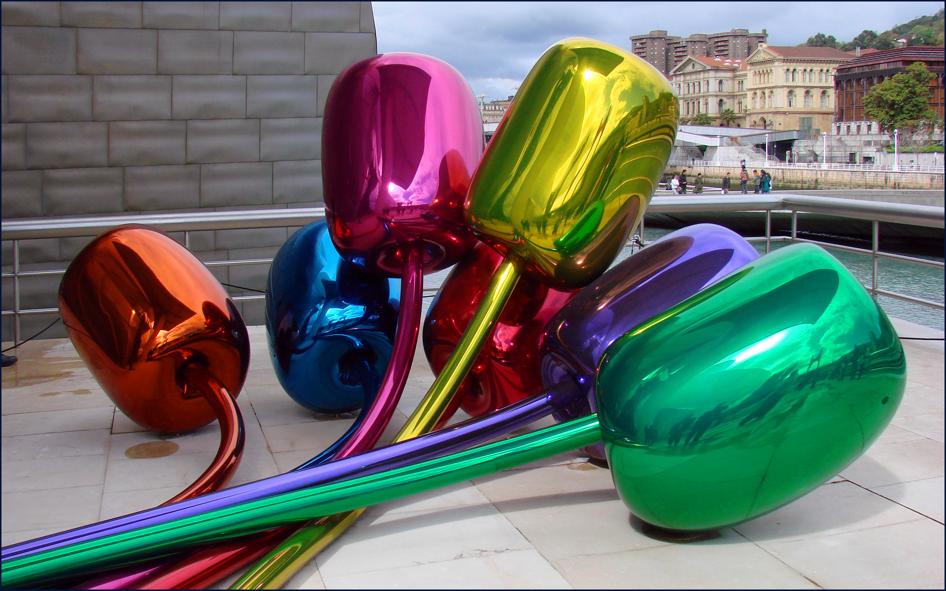 Inauguré en 1997, le musée Guggenheim de Bilbao a été conçu par l'architecte américain Frank O. Gehry. Situé au bord de la ria de Bilbao, il a transformé, en dix ans, l'image de cette ville du pays basque, frappée par la crise industrielle. Il présente des collections d'art contemporain et des expositions temporaires de niveau international. Au premier plan, sur la terrasse de l'atrium, la sculpture "Tulipes" de Jeff Koons, datant de 1995-2004, en acier chromé et recouvert de couches colorées.